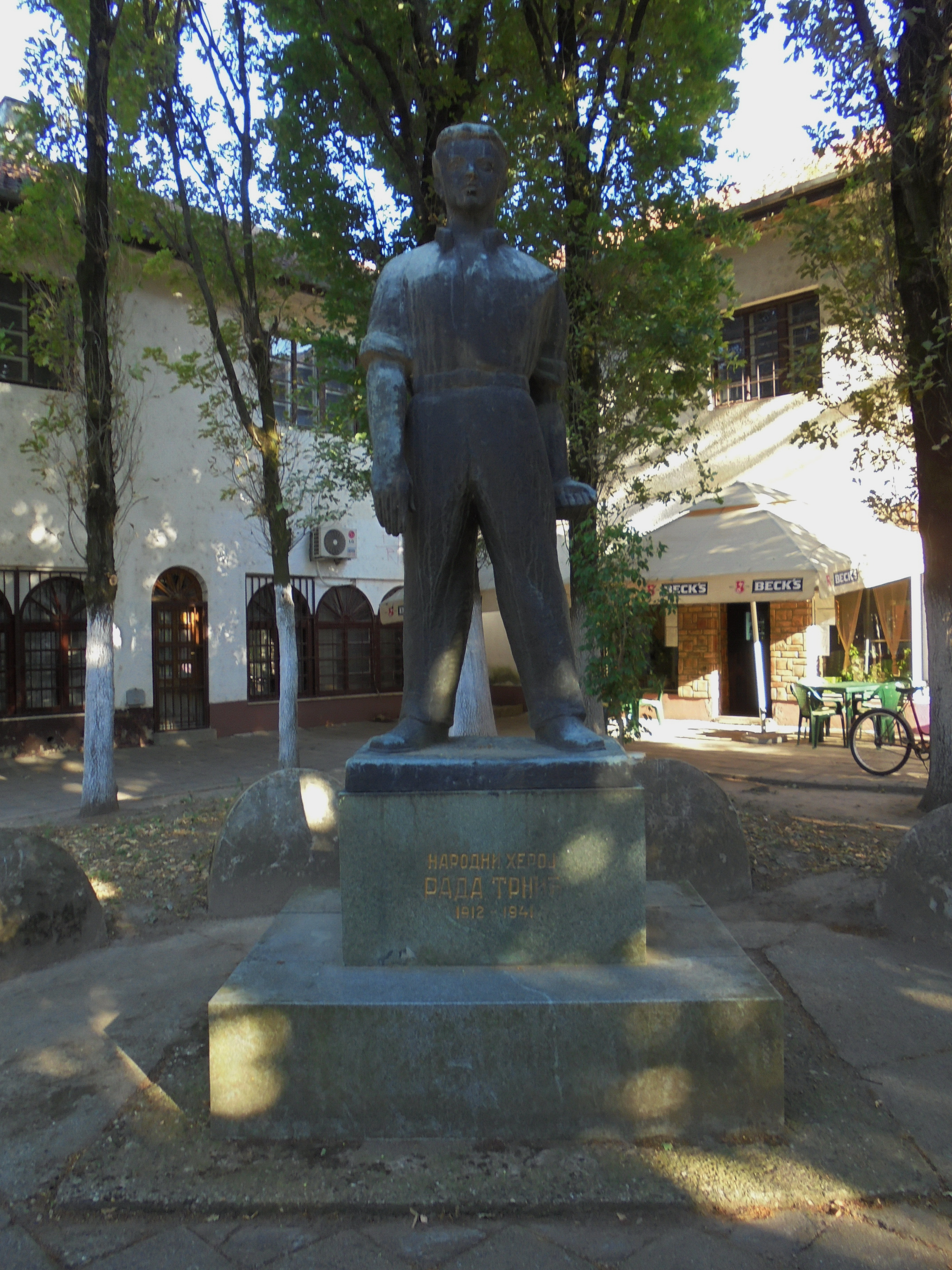 Srpski (latinica): Spomenik u centru Mokrina, podignut Radi Trnicu